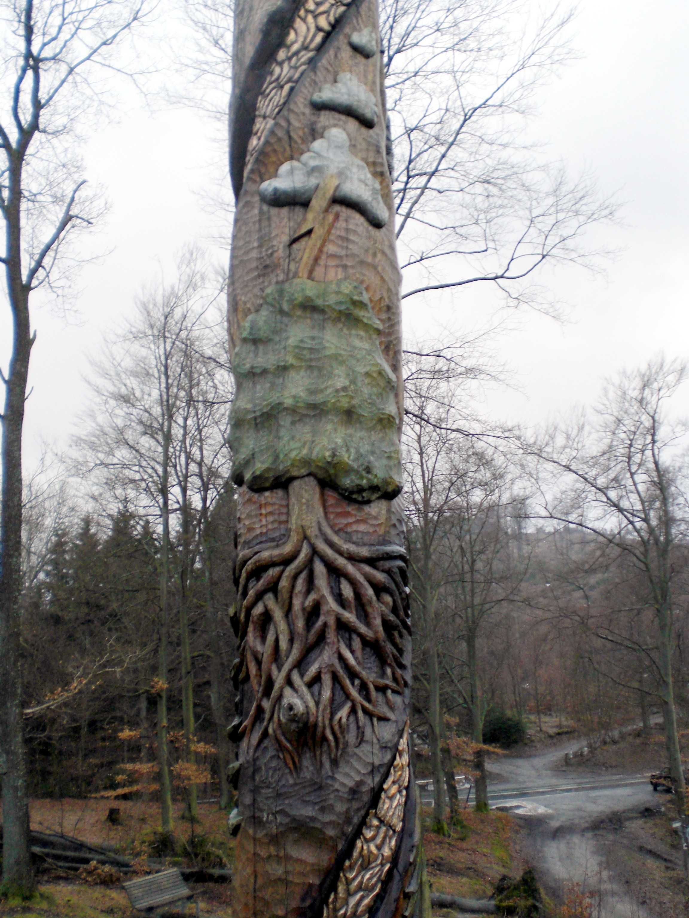 Teil des beschnitzten Stammes der Feuereiche